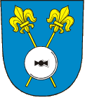 znak obce